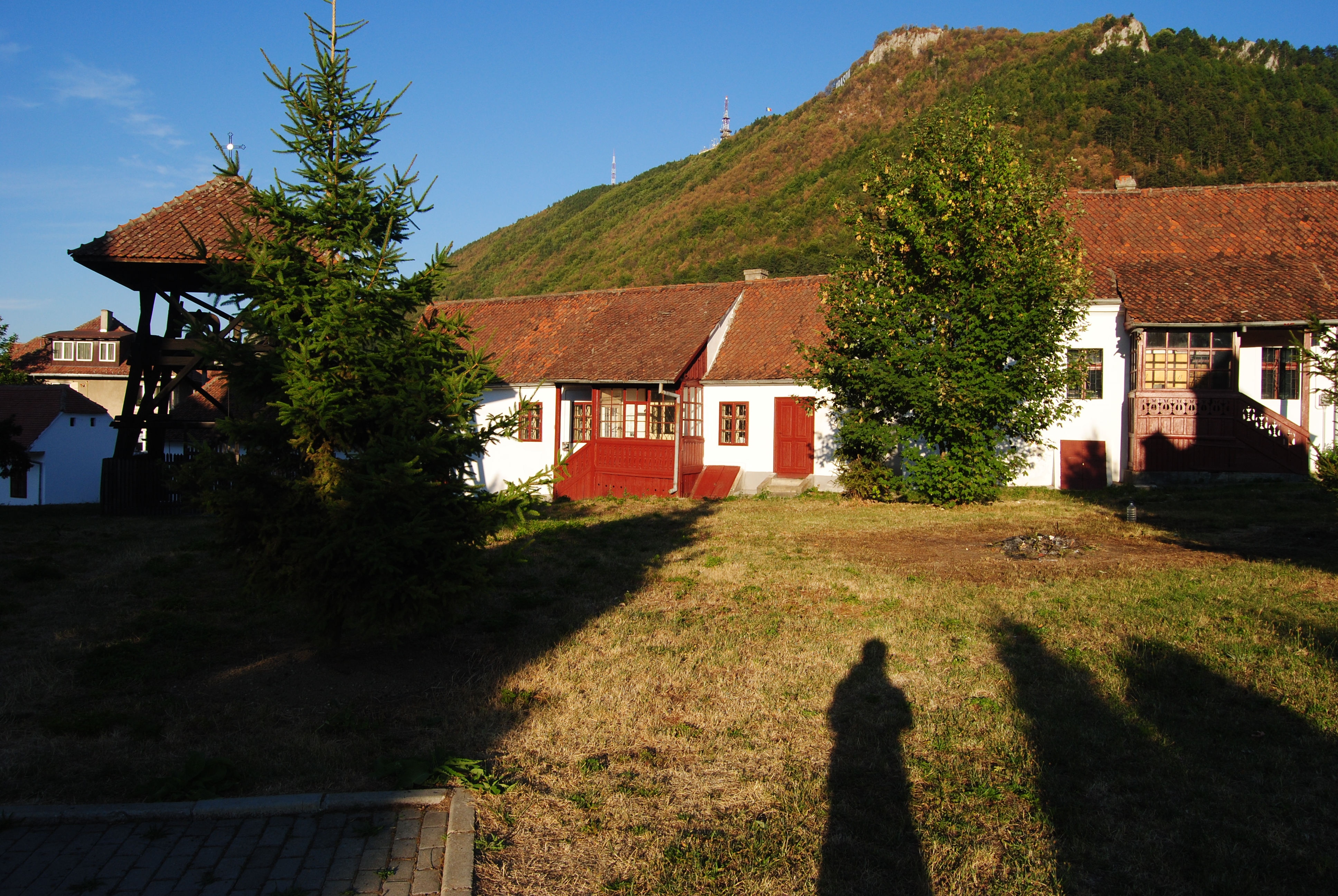 Chilii, Biserica Sf. Nicolae 03